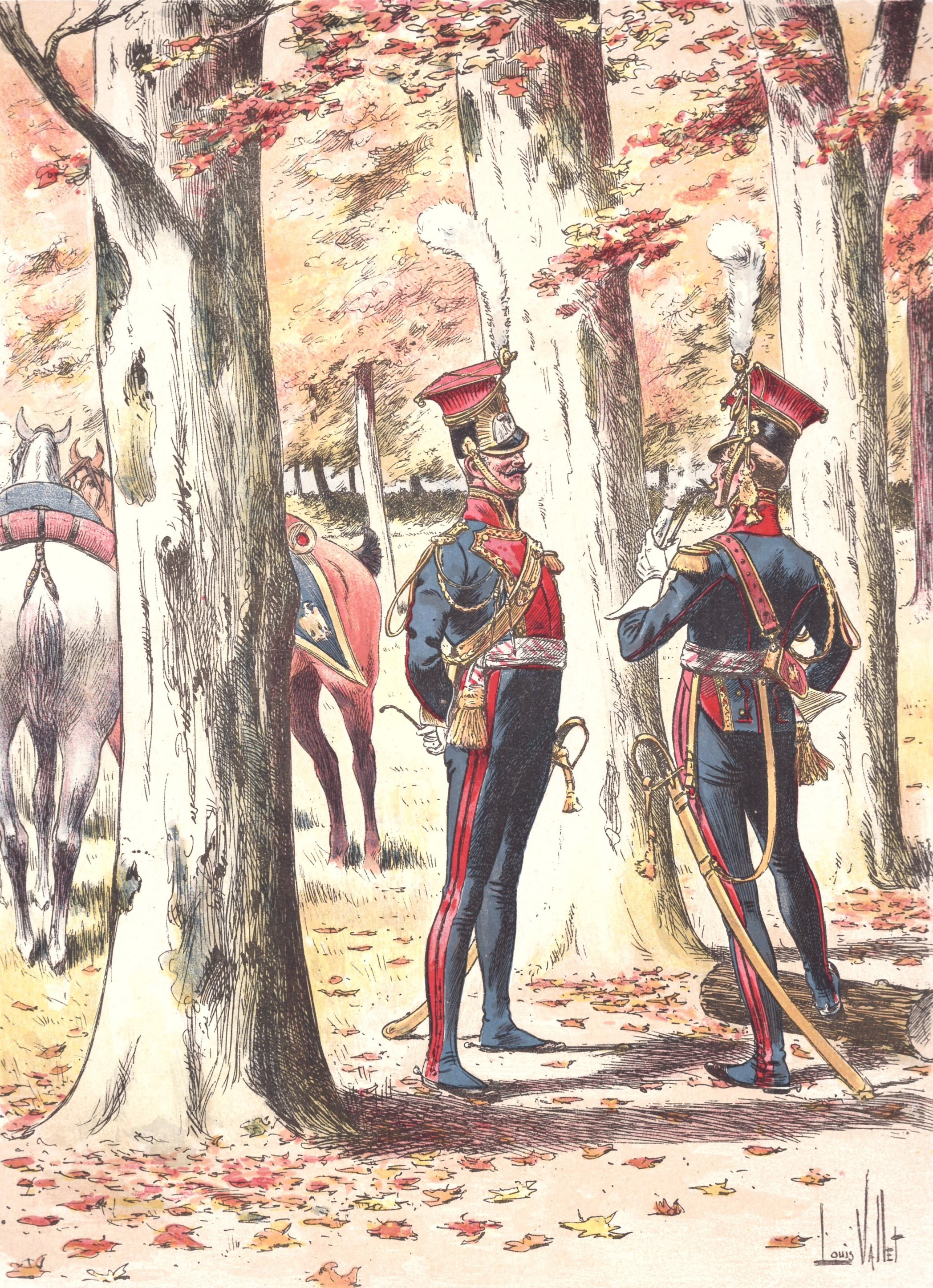 Officiers du 3e régiment de lanciers de la Garde impériale, 1812. Grande tenue.